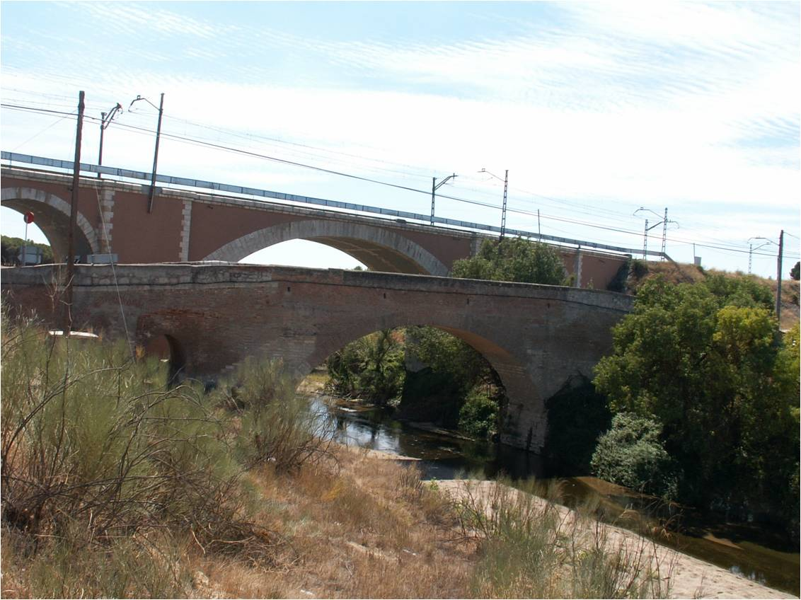 Paso del Ferrocarril Madrid-Hendaya sobre el Rio Adaja.